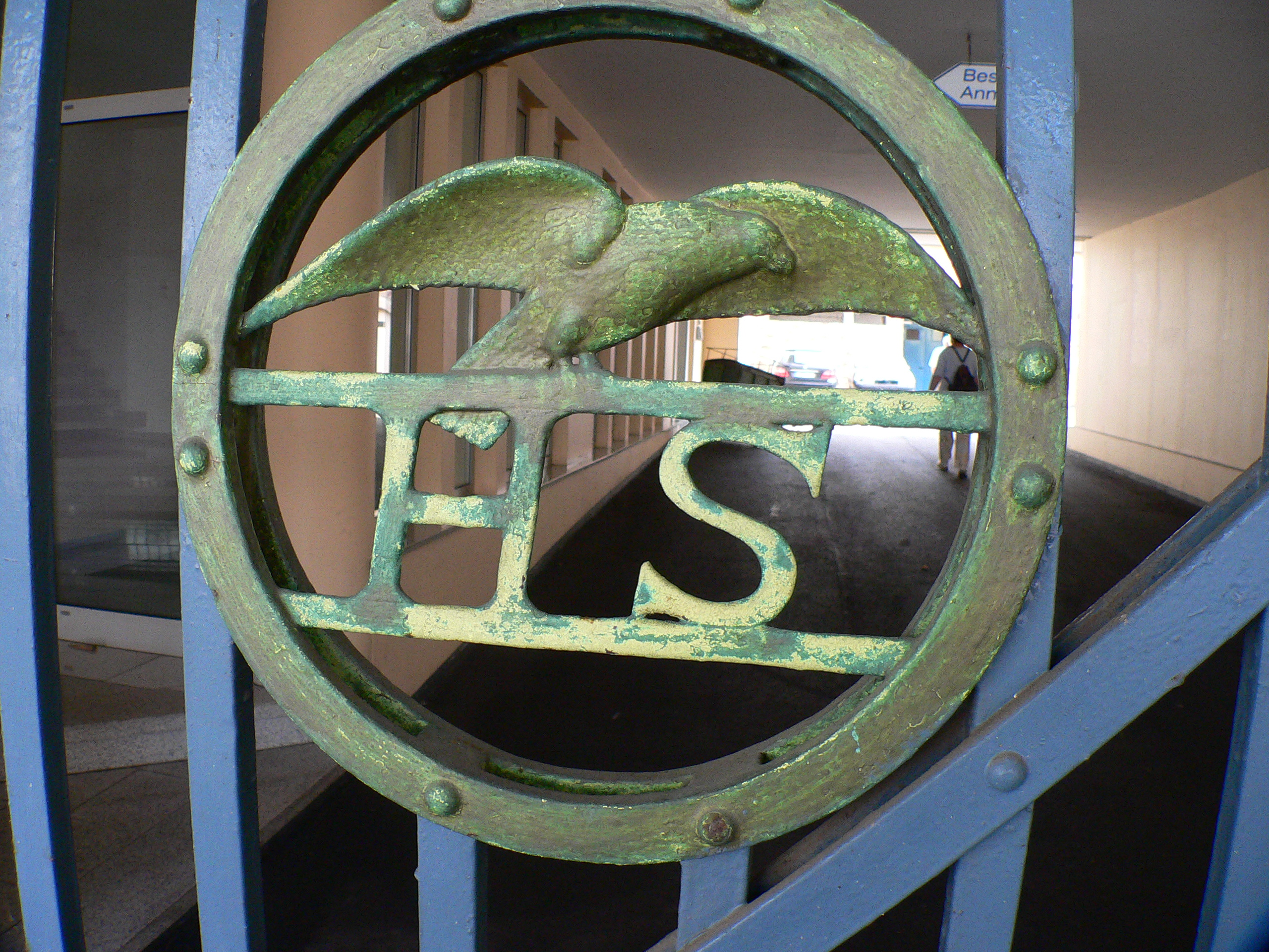 Farbenfabrik Habich Söhne in Veckerhagen (Reinhardshagen), Weserbergland, Hessen – Firmenemblem (Habich’s Söhne) aus 1914 am Einfahrtstor.